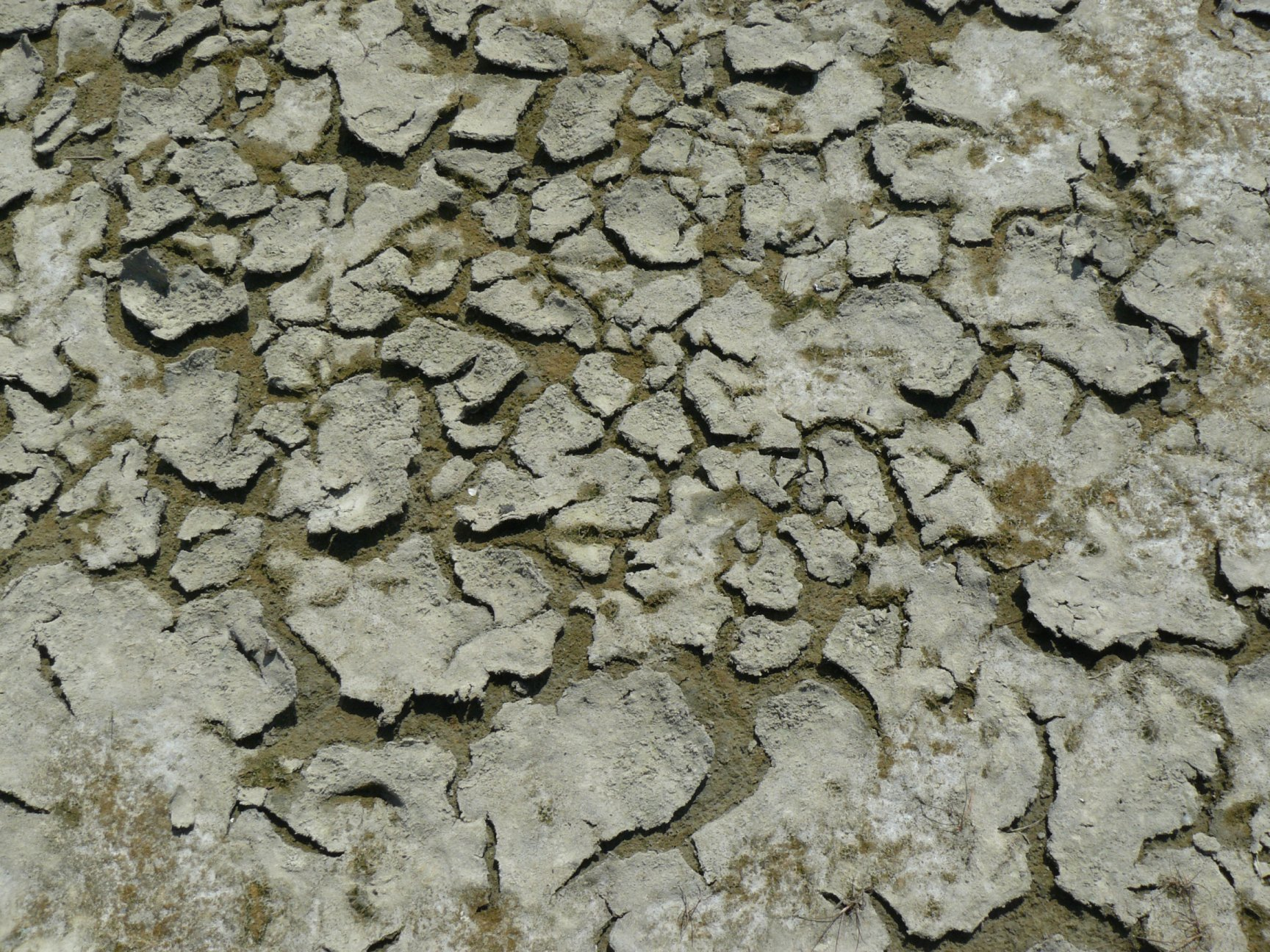 Krimpscheuren in opgedroogd laagje slib op de strandvlakte van Schiermonnikoog